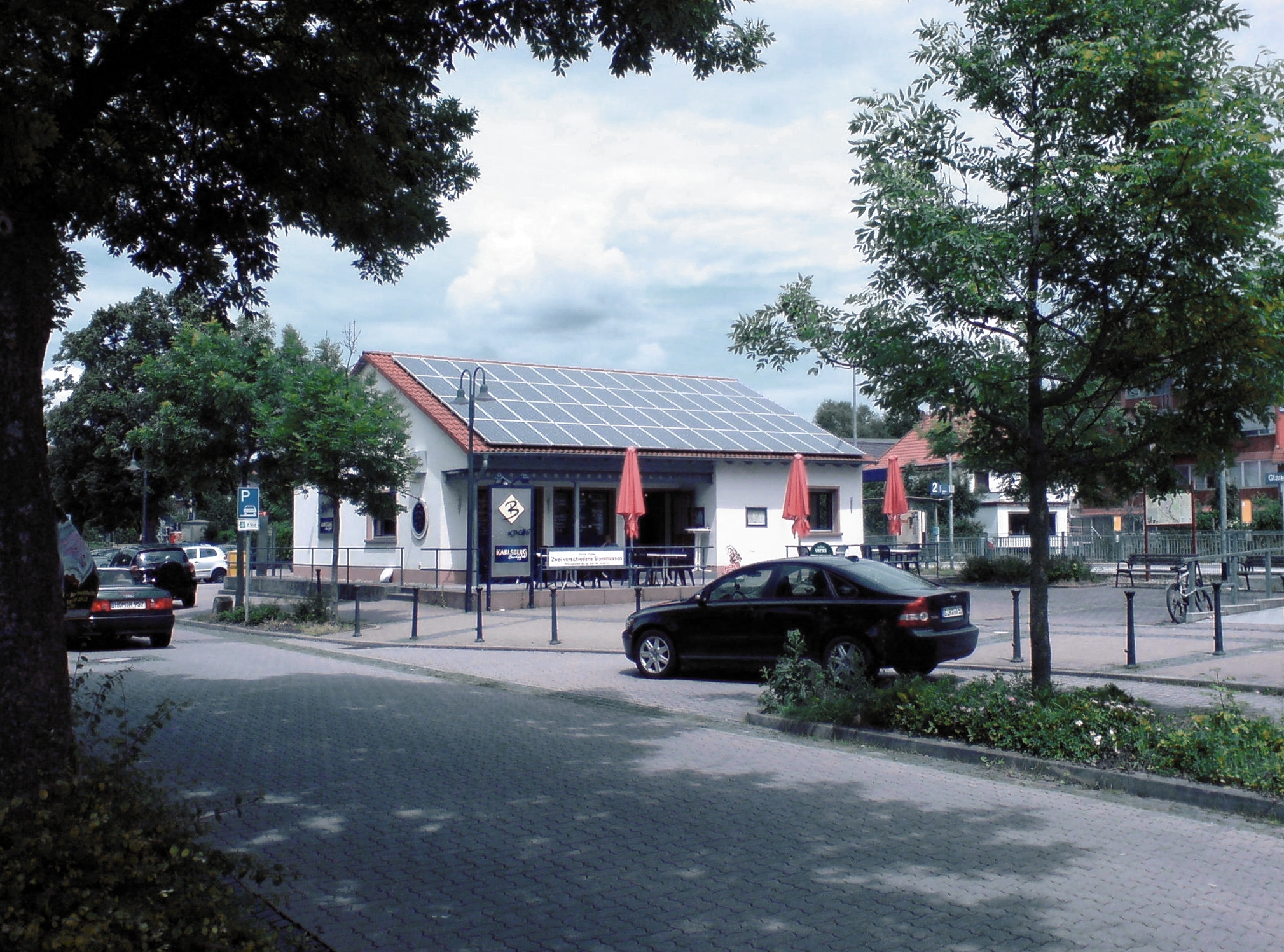 Nebengebäude Bahnhof Glan-Münchweiler